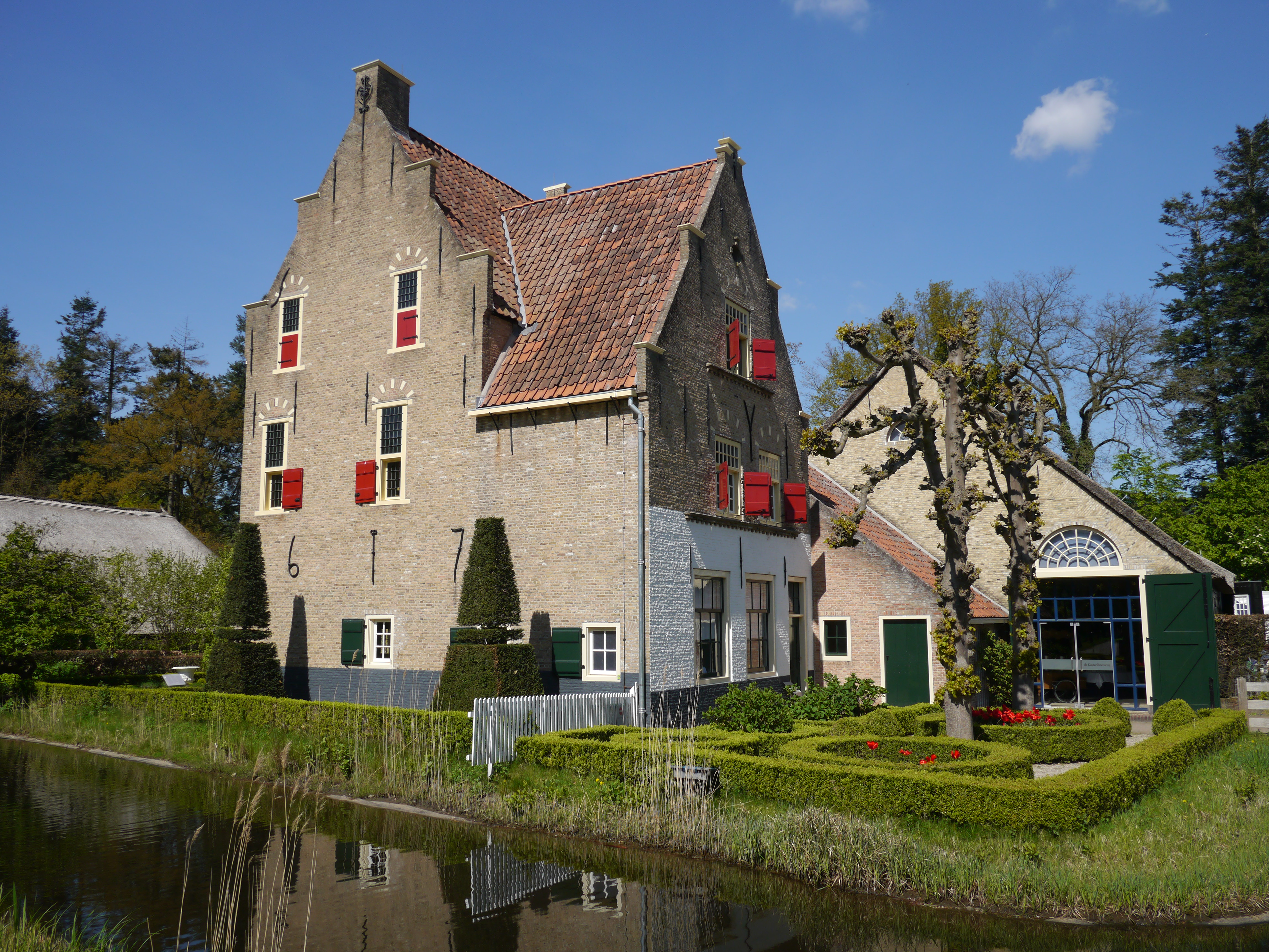 Kasteelboerderij - Openluchtmuseum Arnhem